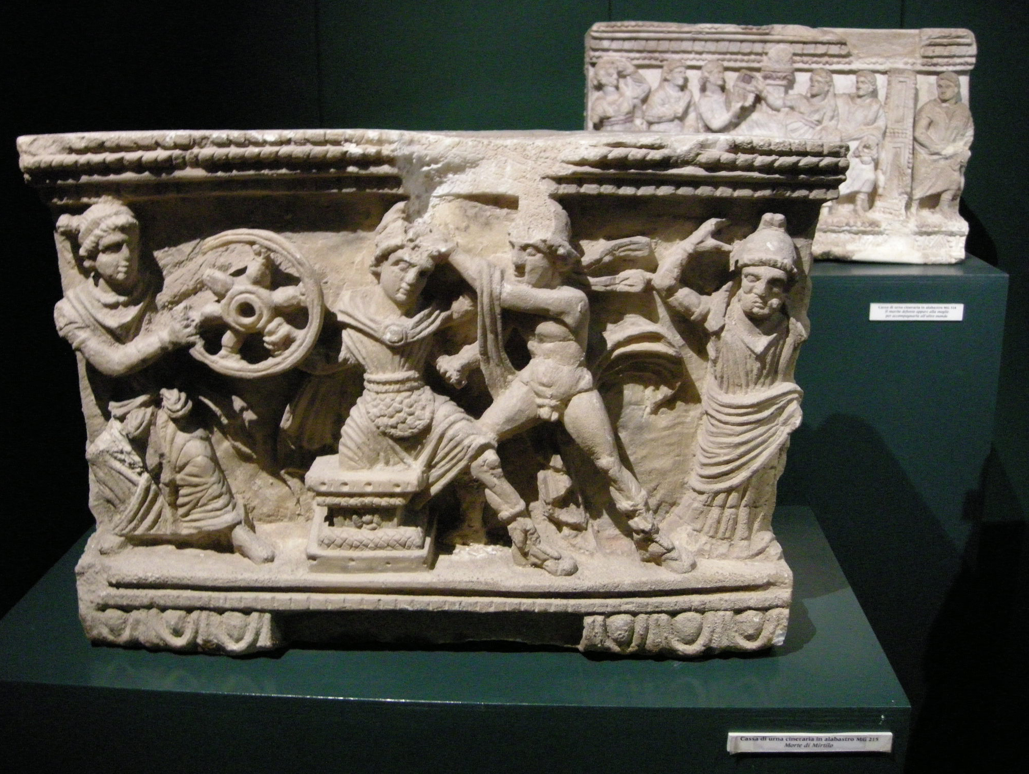 Museo guarnacci, urnetta, terza serie